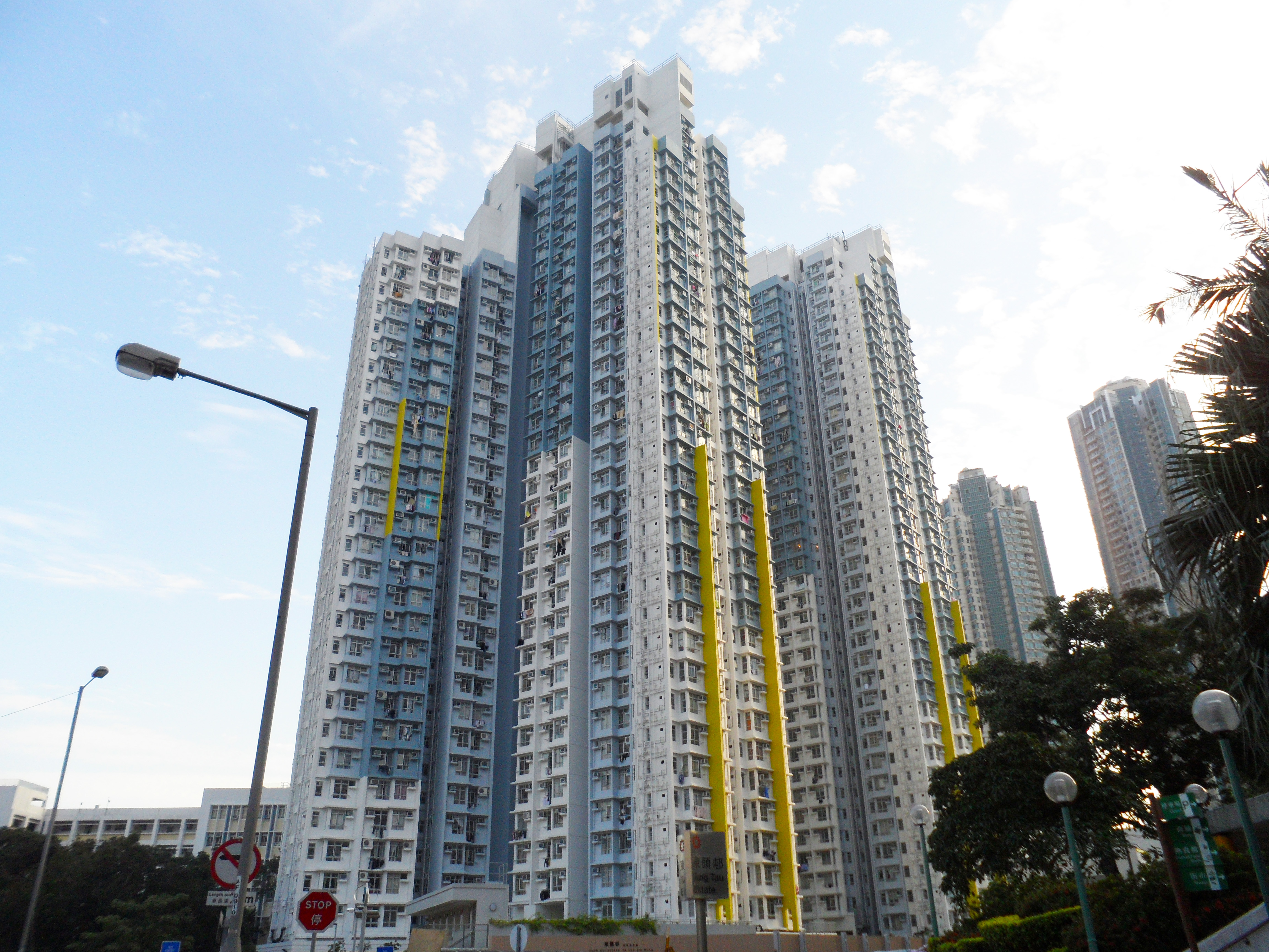 東匯邨兩座樓宇，名為匯仁樓及匯心樓